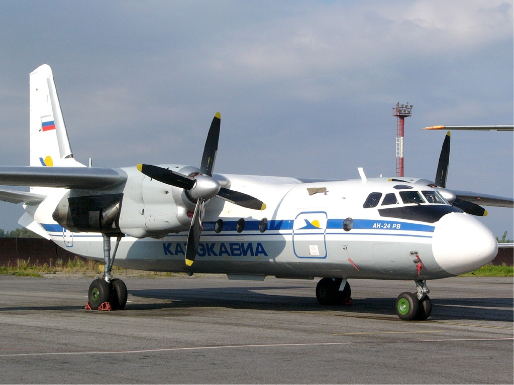 Katekavia Antonov An-24RV